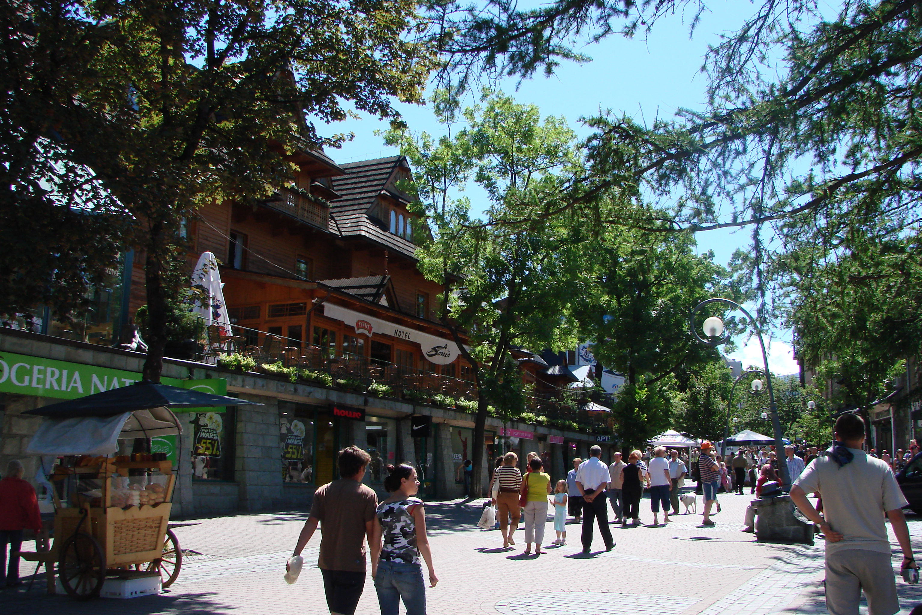 Zakopane, Poland